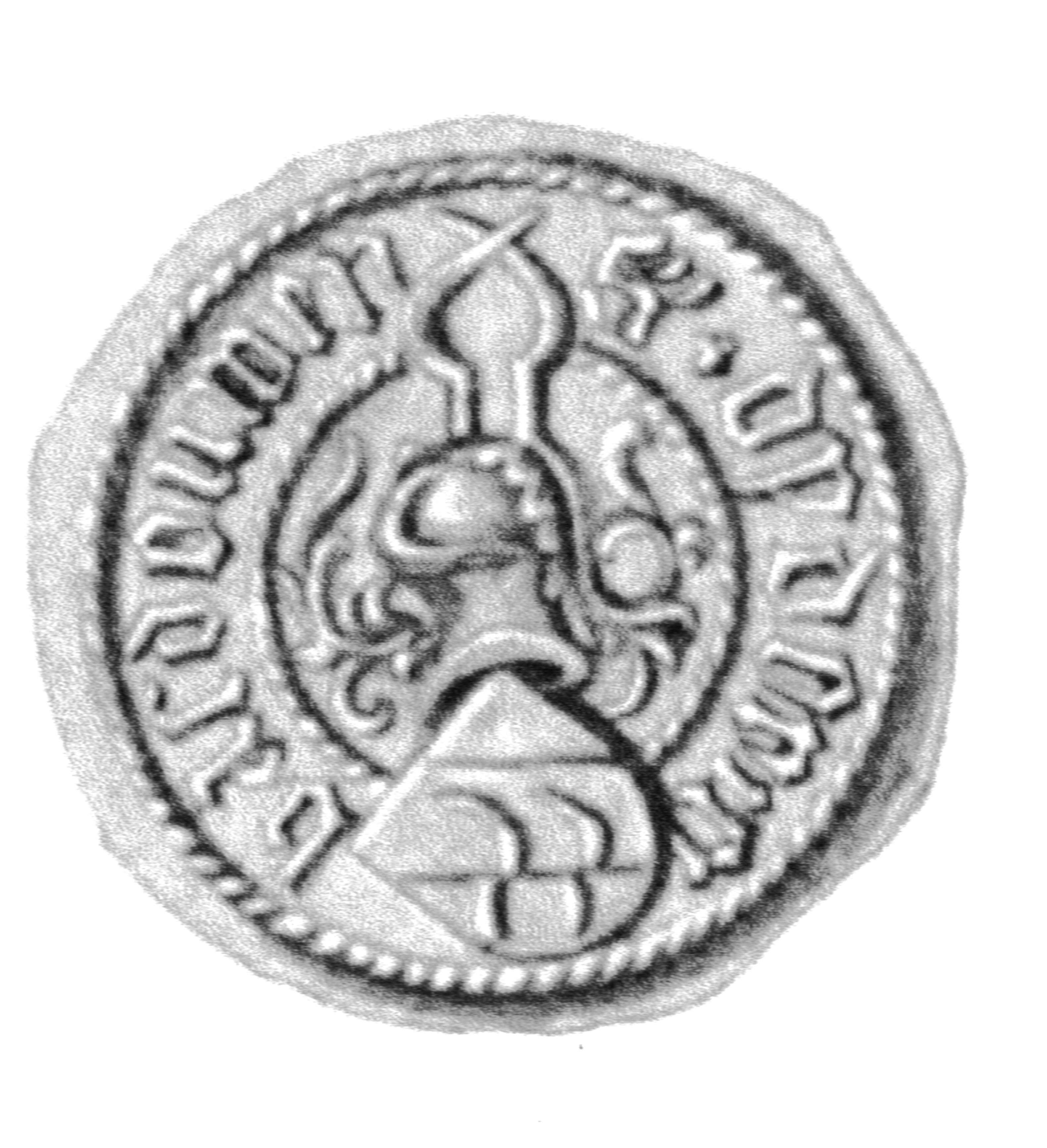 Siegel des Ratsmannes Dietrich Basedow. Das Siegel stammt aus der Zeit um 1499. Siehe Emil Ferdinand Fehling: Lübeckische Ratslinie, Nr. 563 (Dietrich Basedow).